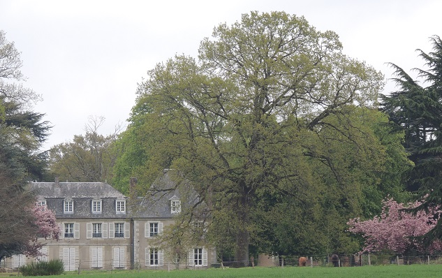 Château de Bouthonvilliers, facade arrière avec le corps principal à gauche et un des pavillons latéraux à droite derrière les arbres fleuris du parc